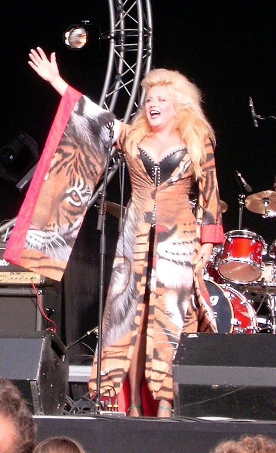 Mieke Stemerding